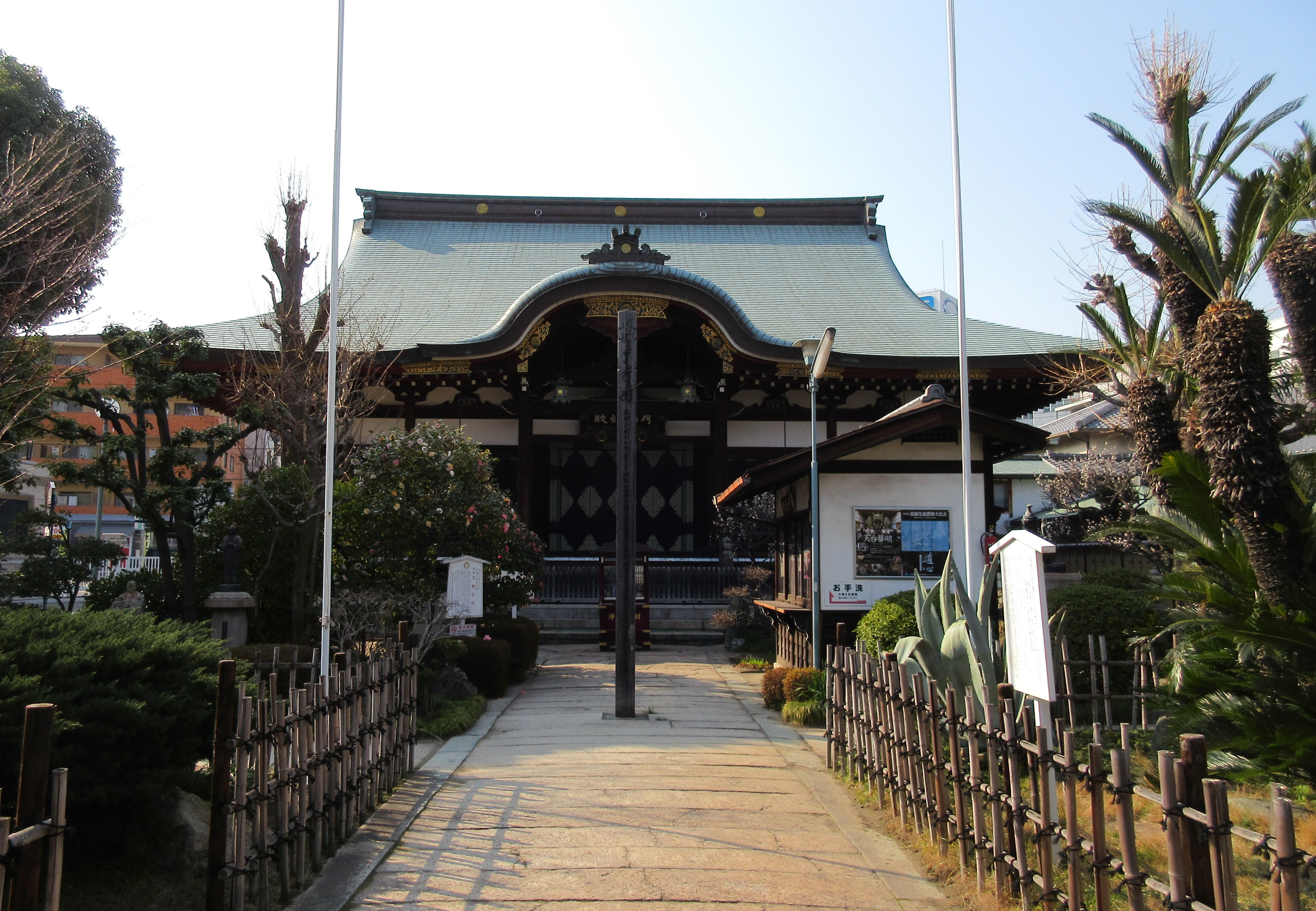 能福寺本堂